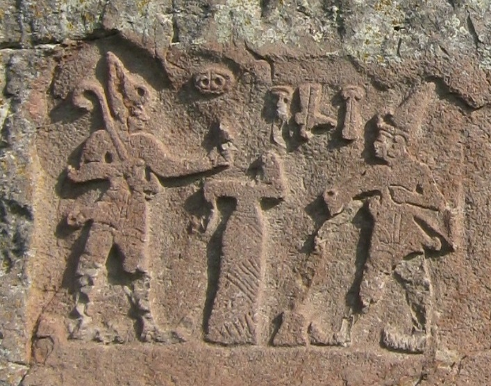 Firaktin, Hethitisches Relief bei Kayseri, Türkei